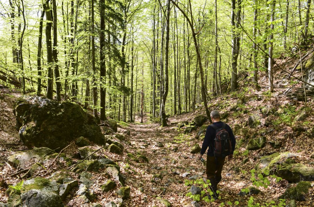 Bøkeskogen i Dalaåsen en tidlig vårdag.